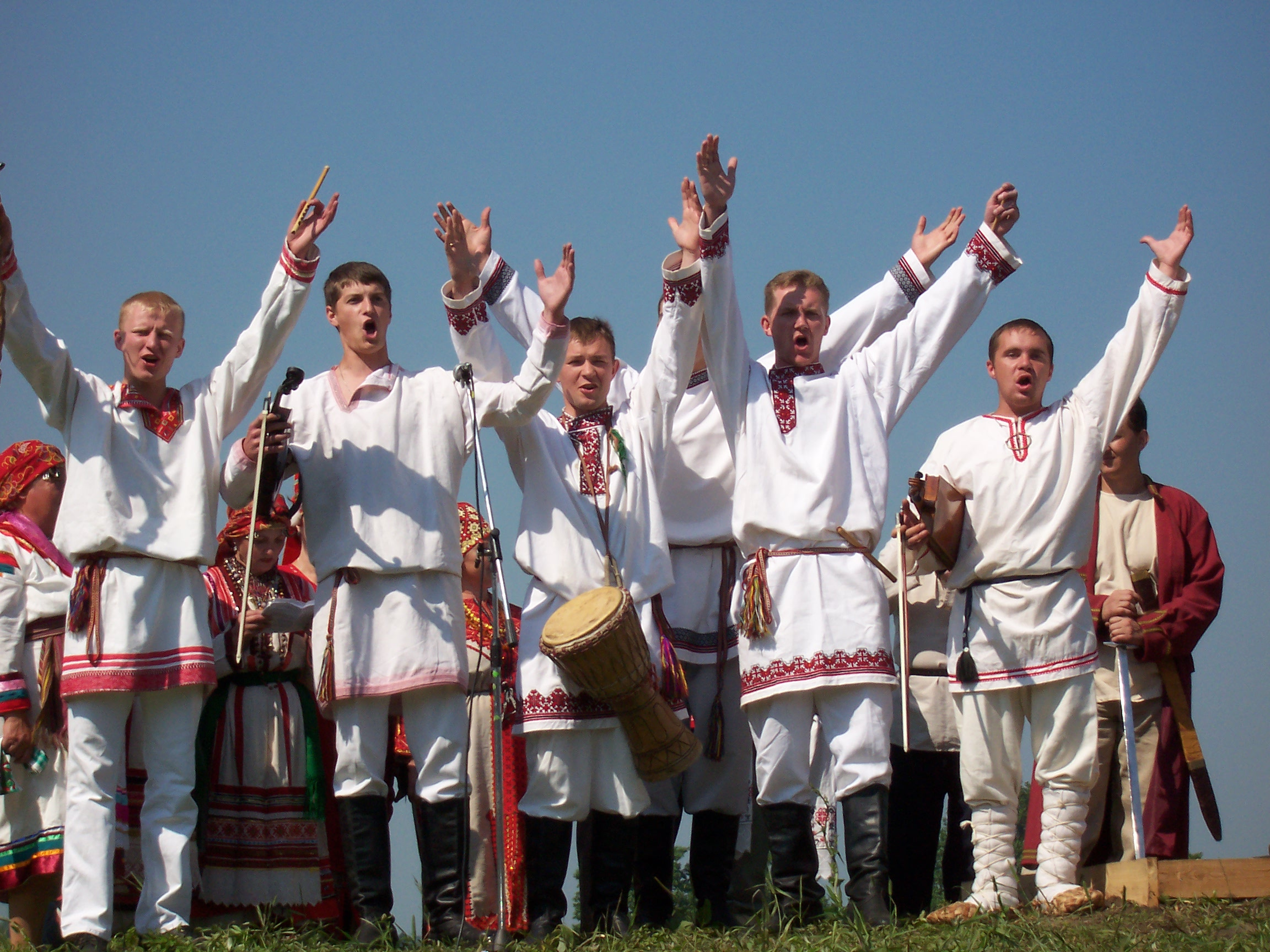 группа "Торама" на Раськень Озкс